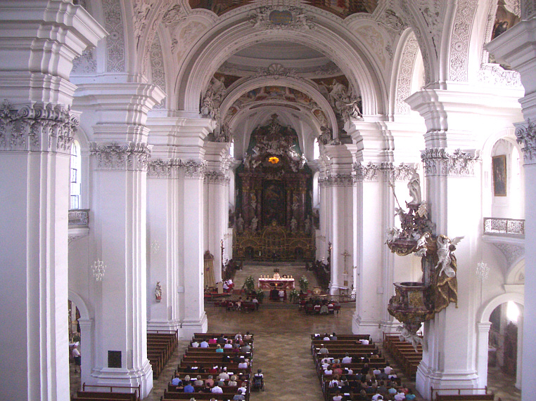 Weingarten, Germany: Basilika St. Martin, Hauptschiff